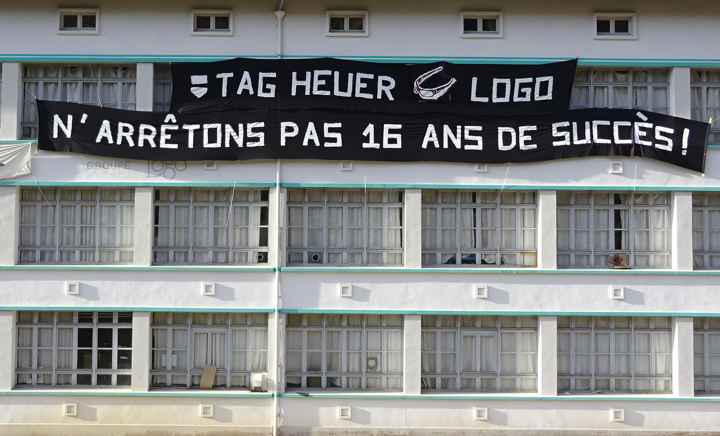 Façade de l'usine Logo de Morez en novembre 2016.